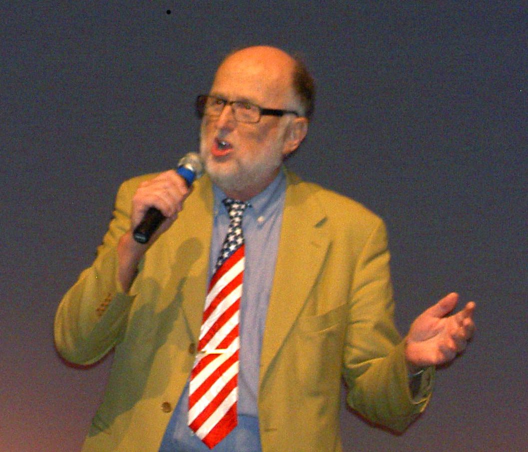 Musikern och sångaren Stig Sjöberg från Vittsjö